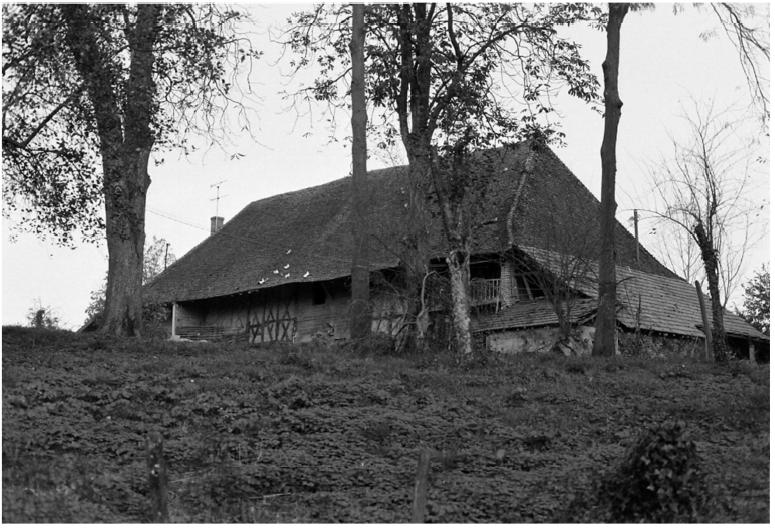 Saffrelogis1